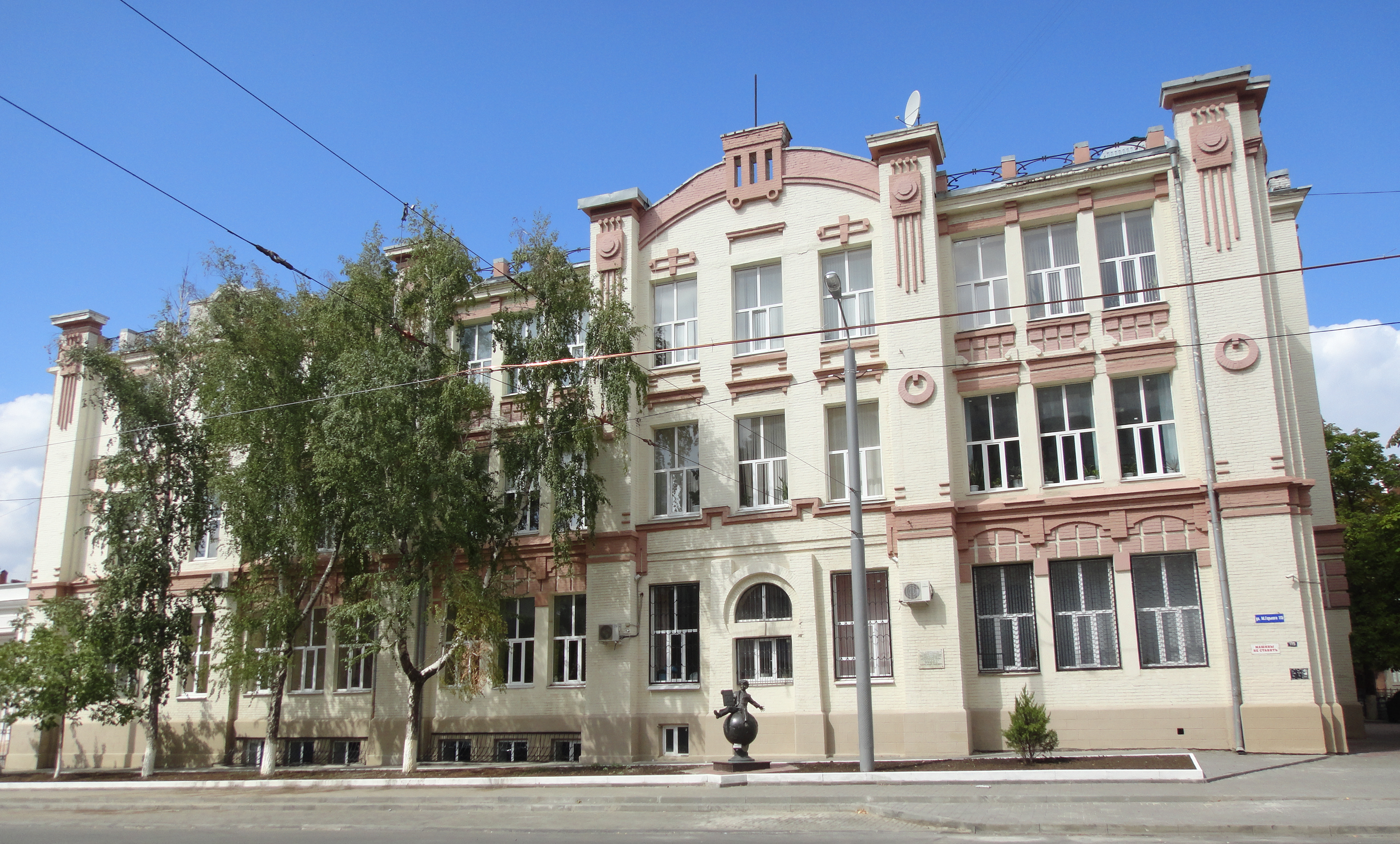 Здание частной гимназии степанова (Ростовская область, Ростов-на-Дону, м. горького улица, 115)